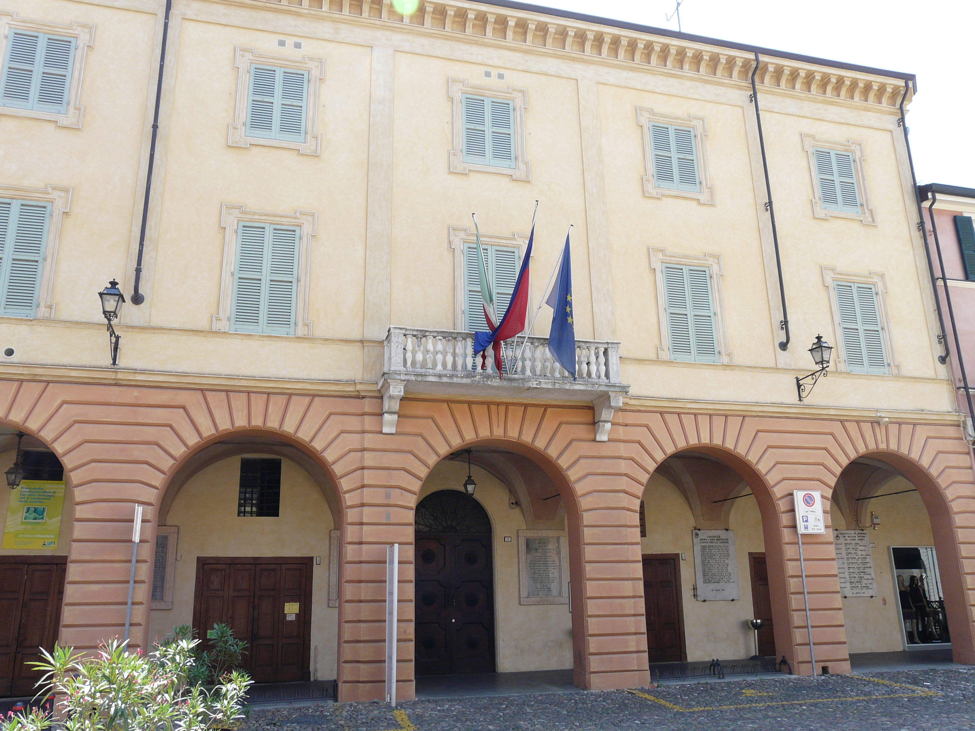 Municipio di Guastalla, Emilia-Romagna, Italia